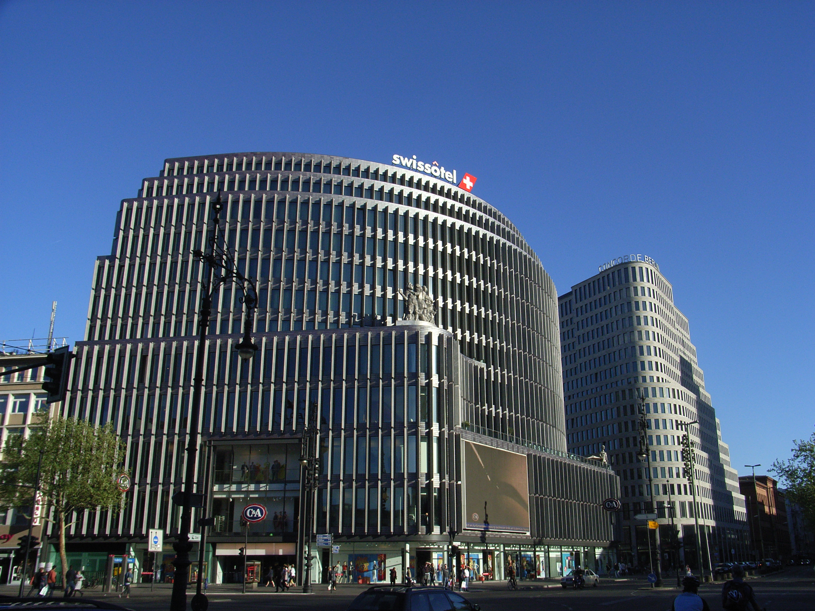 Dieses Bild zeigt zwei Hochhäuser in Berlin.